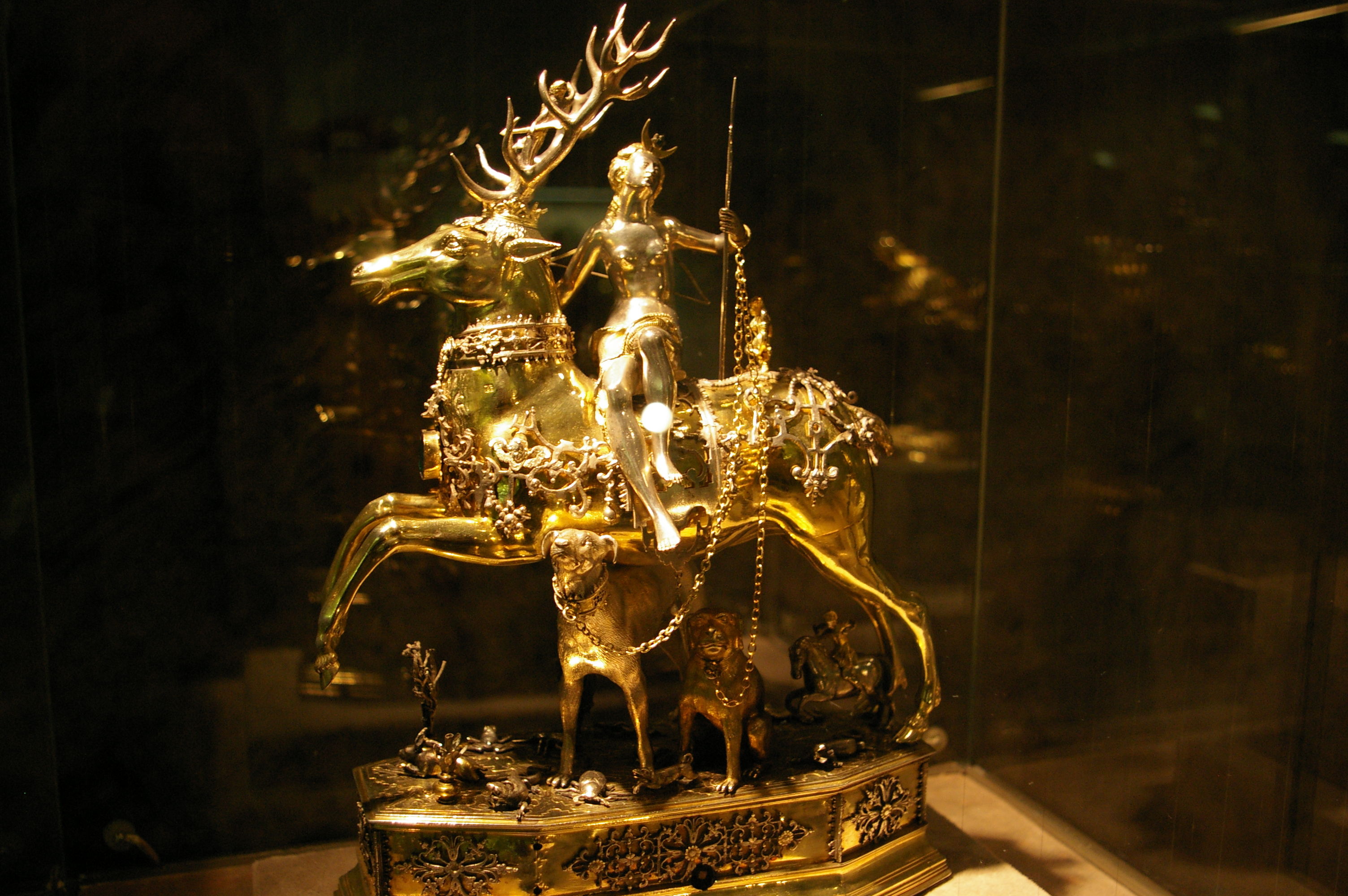 Le château d'Elzt